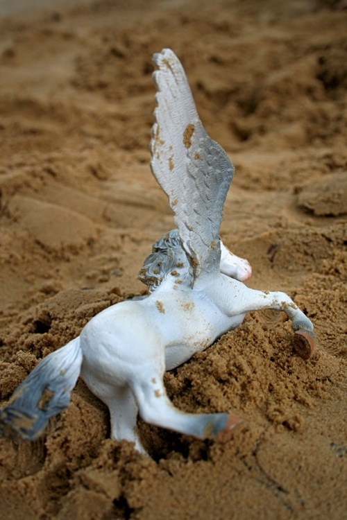 Pégase à moitié enseveli dans le sable, référence à un scène du film Blade Runner